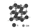 ساختار